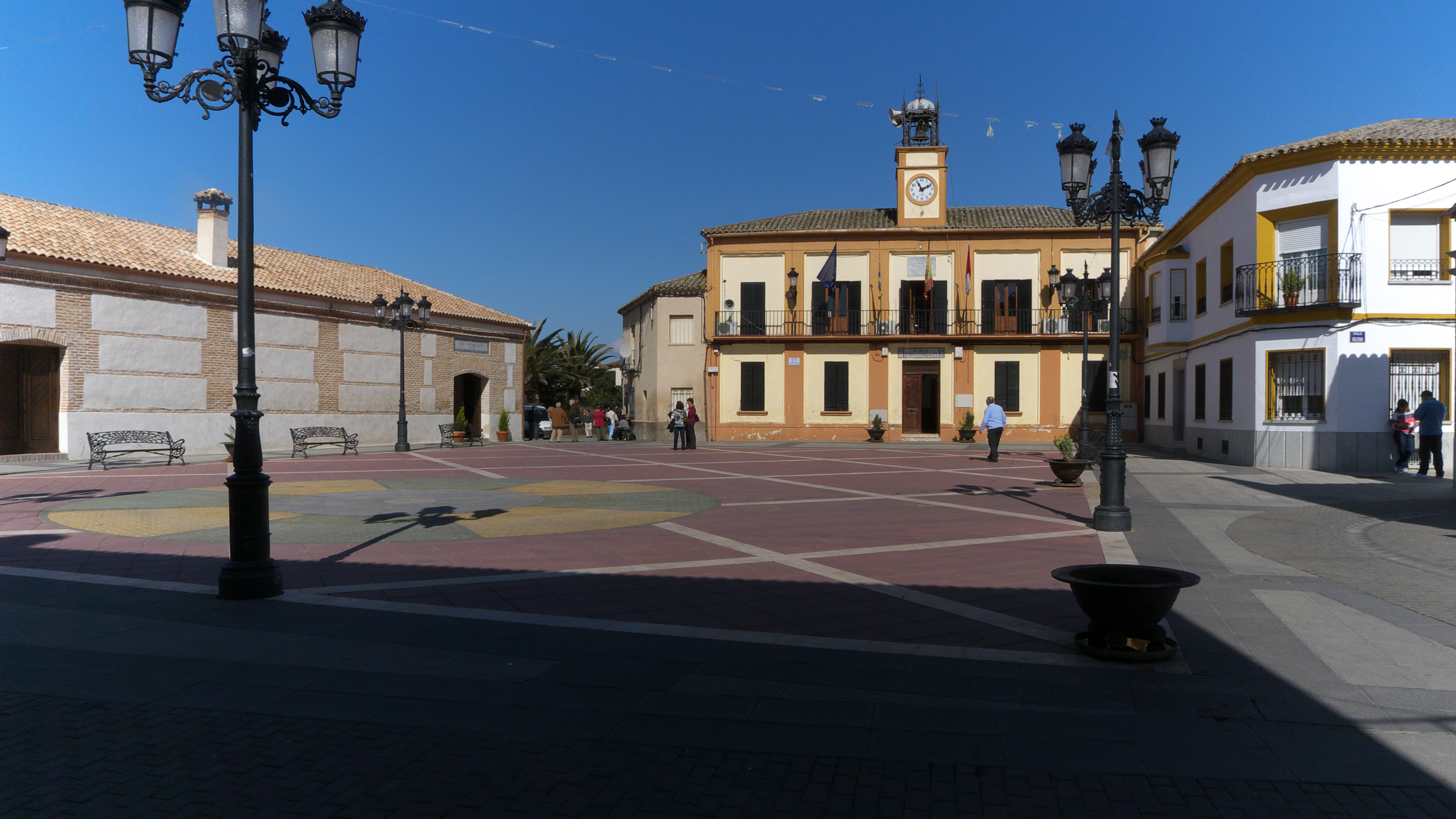 Preside el Ayuntamiento de la localidad